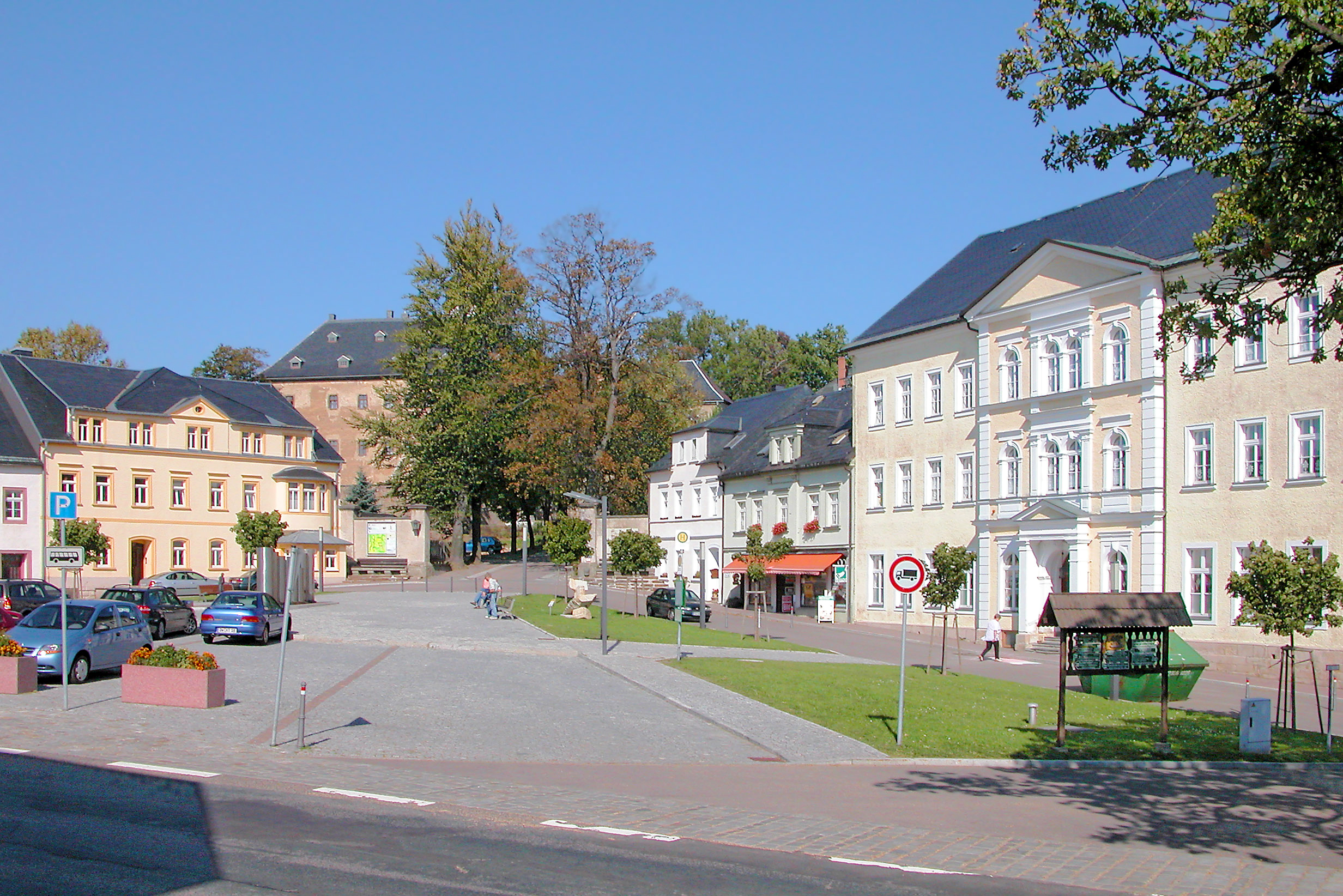 25.09.2006 09623 Frauenstein: Blick vom Markt zum Aufgang zu Burg und Schloß. [DSCN11810.TIF]20060925220DR.JPG(c)Blobelt